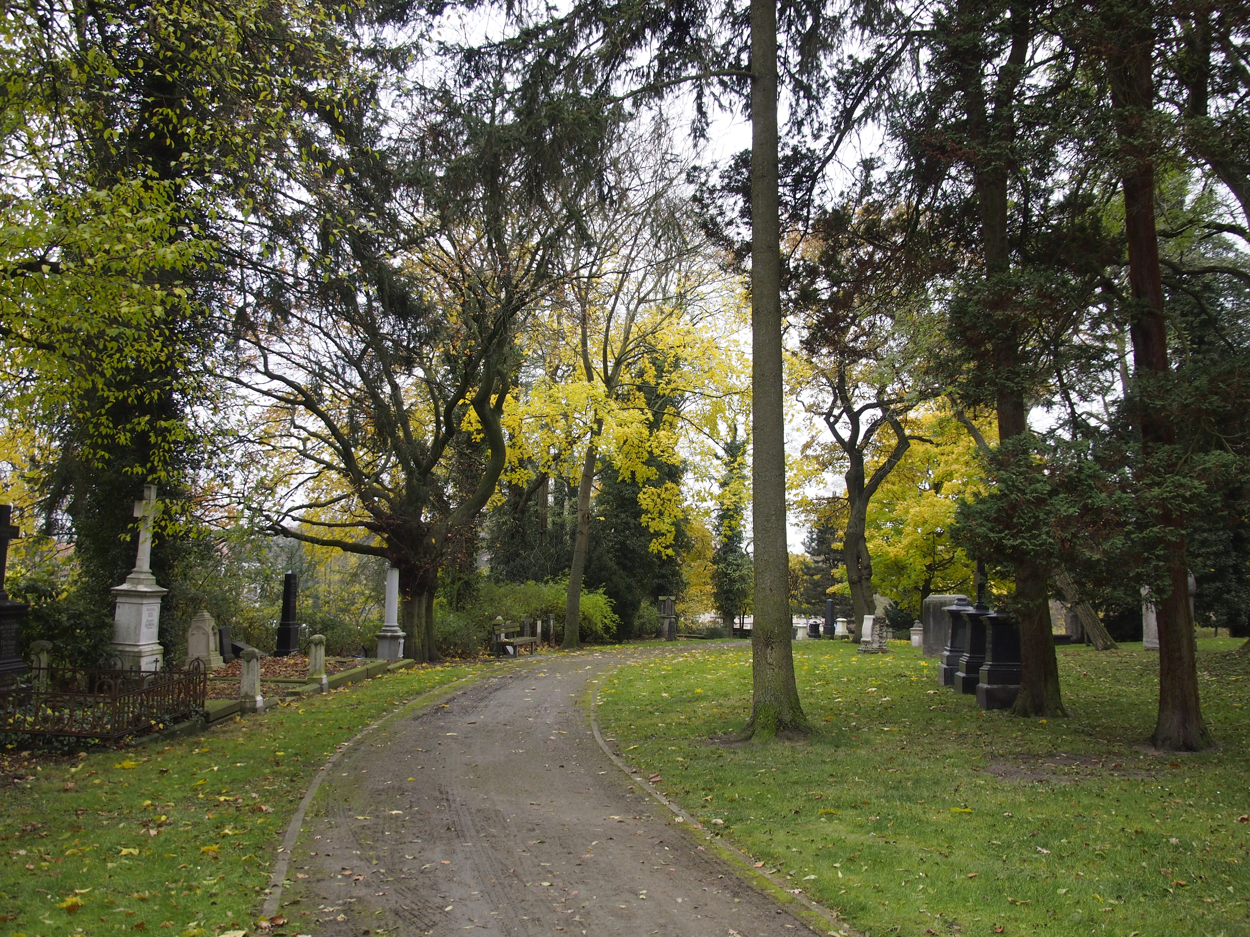 Hehlentorfriedhof in Celle, Niedersachsen